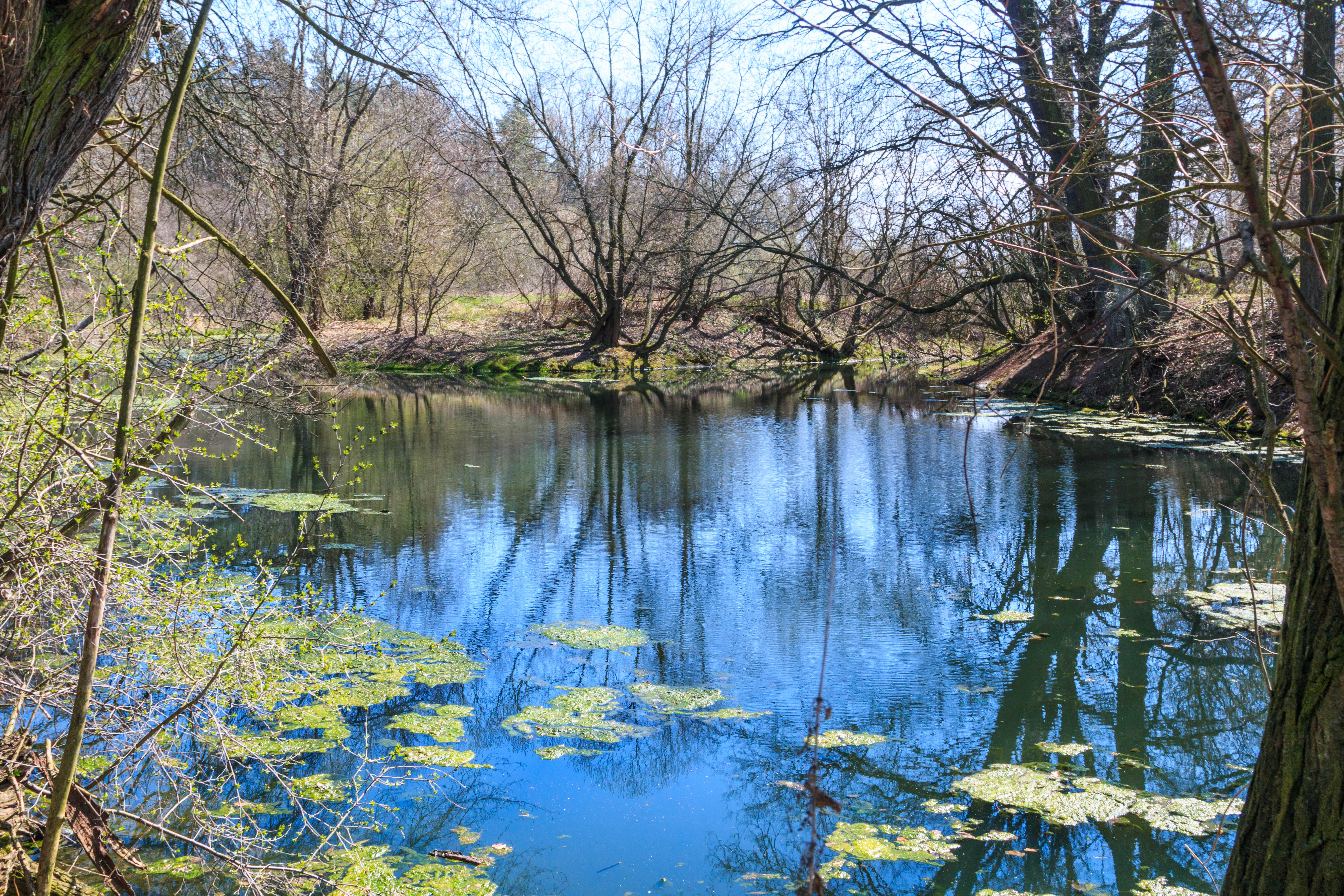 Jordáně - mrtvé rameno Labe u Řečan nad Labem Project: Vodstvo.